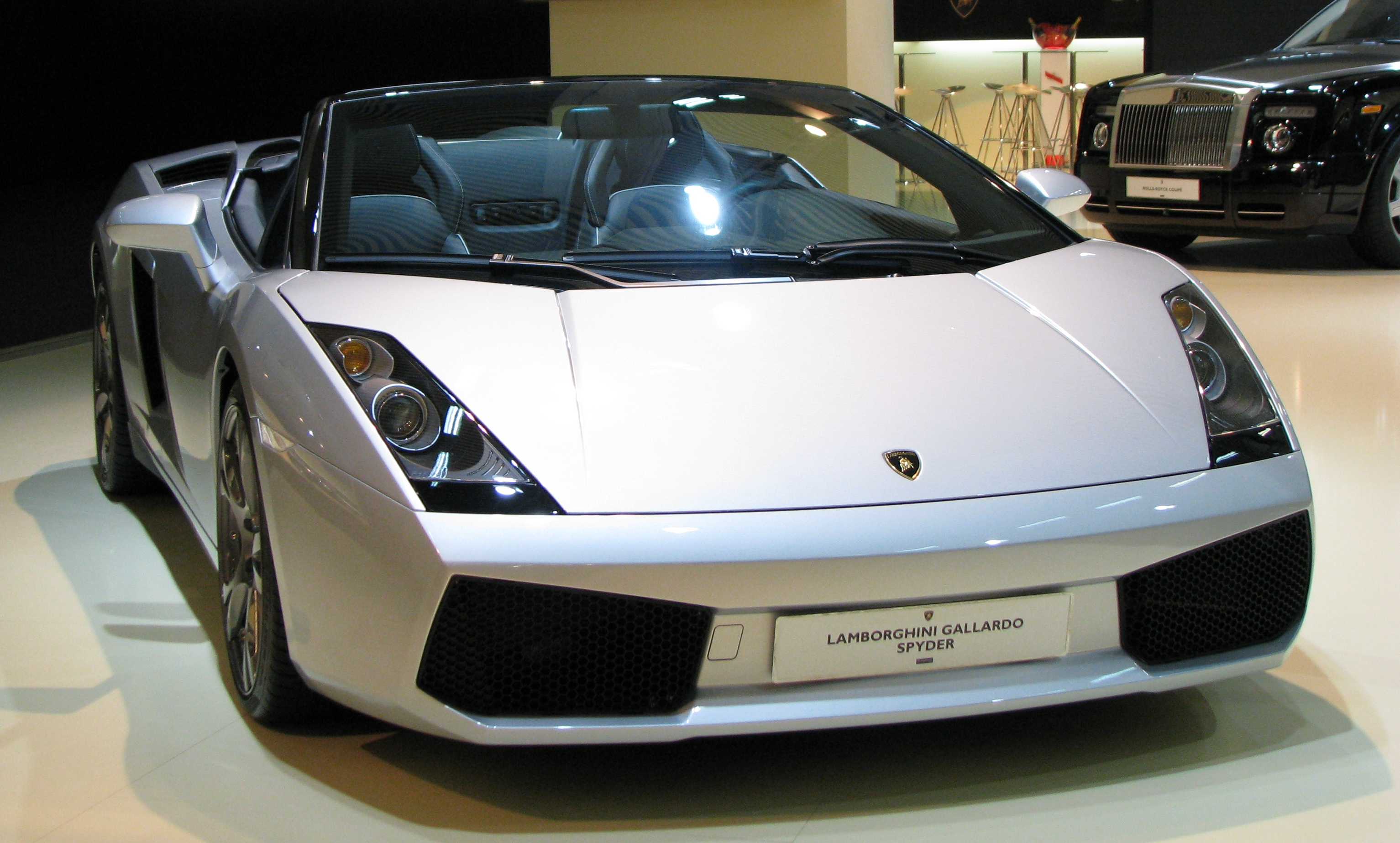 Lamborghini Gallardo Spyder gris en el Salón Internacional del Automóvil de Barcelona 2009.